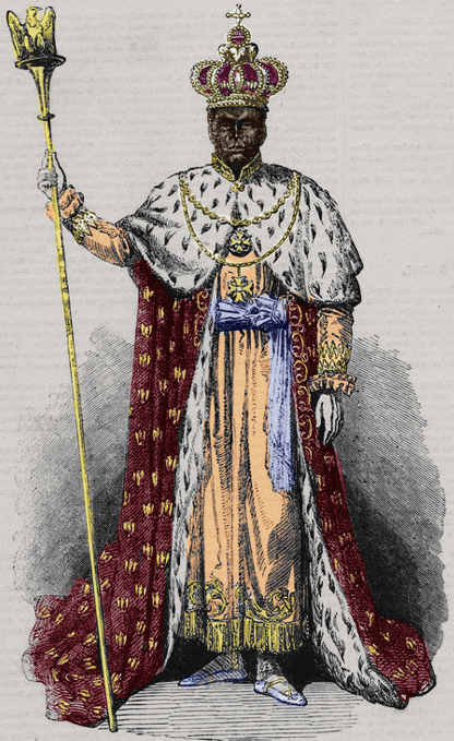 Faustin d'Haïti